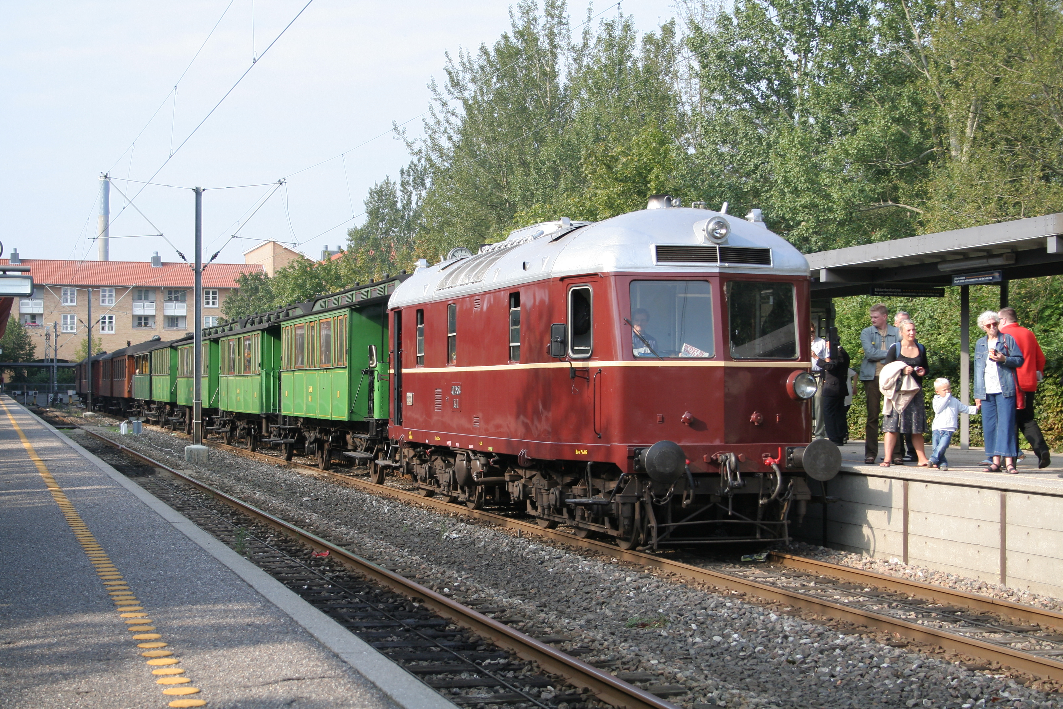 A restored train from Nordsjællands Veterantog, seen here at Farum station.